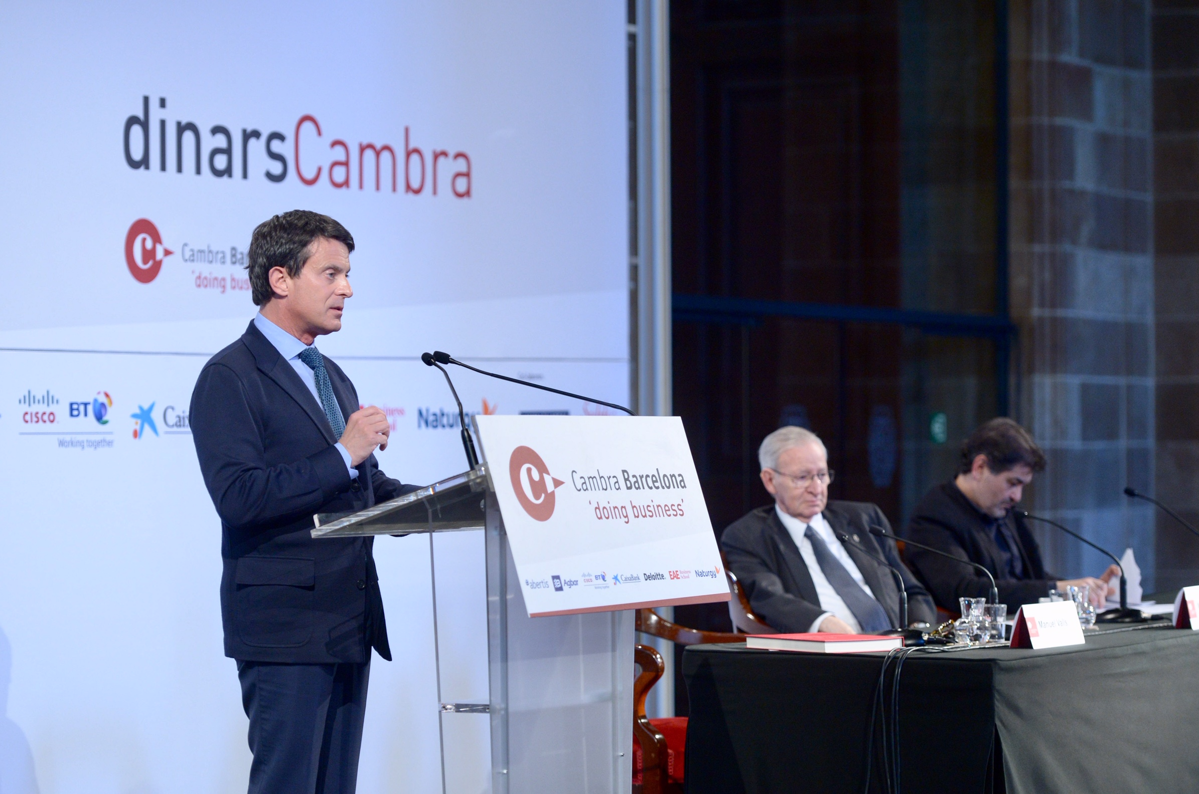 Pla detall del candidat a l'Ajuntament de Barcelona, Manuel Valls, durant la seva intervenció als Dinars Cambra on ha explicat el seu model de ciutat.